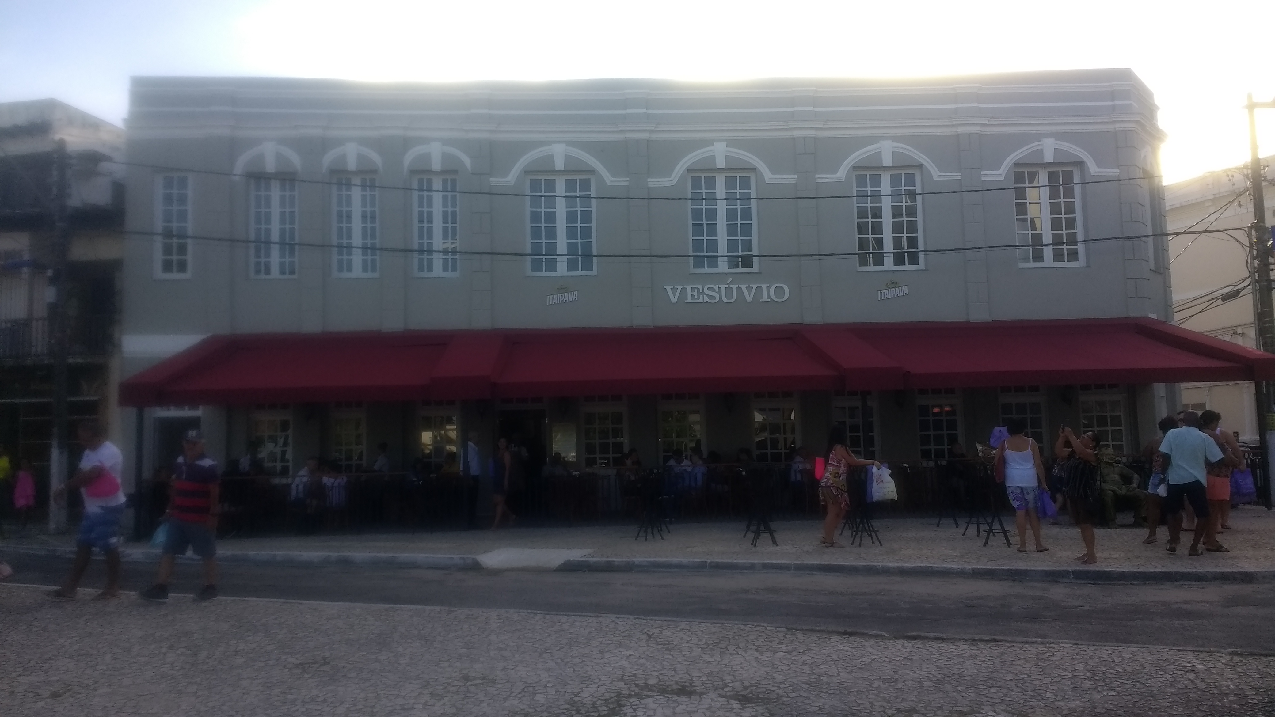 Bar Vesúvio, situado na praça São Sebastião centro, criado por Borges de Barros, em 1915.